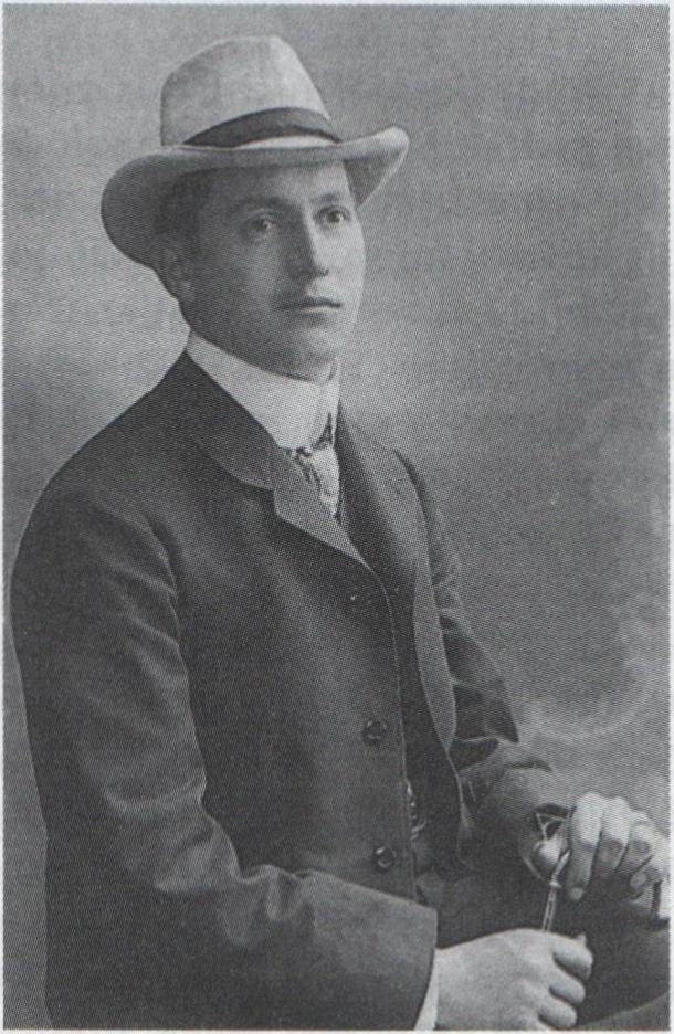 Toni Wolter, Portraitaufnahme in Dresden